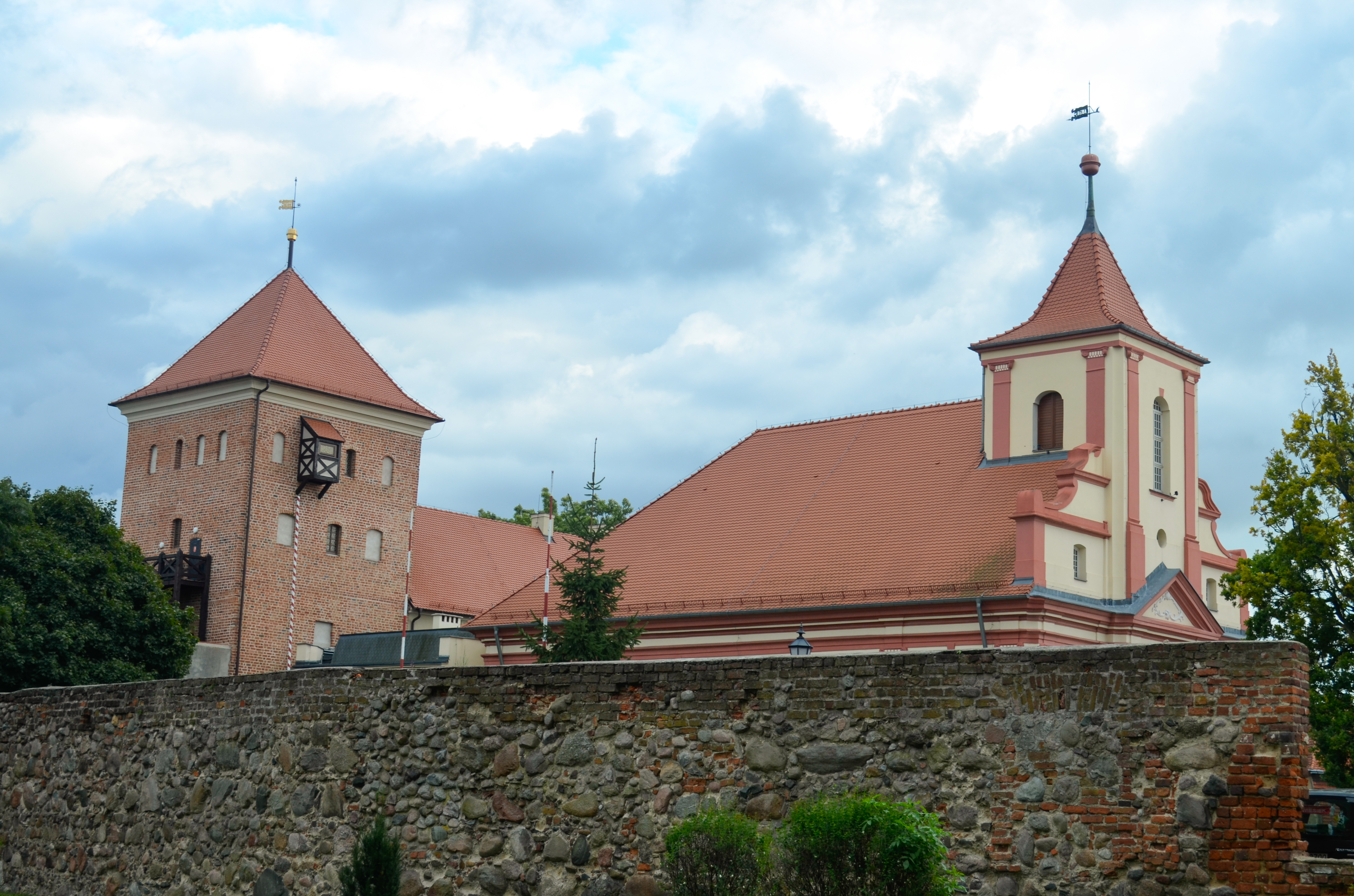 Sulechów - zamek z wieżą (z lewej) i dawny zbór kalwiński (z prawej)